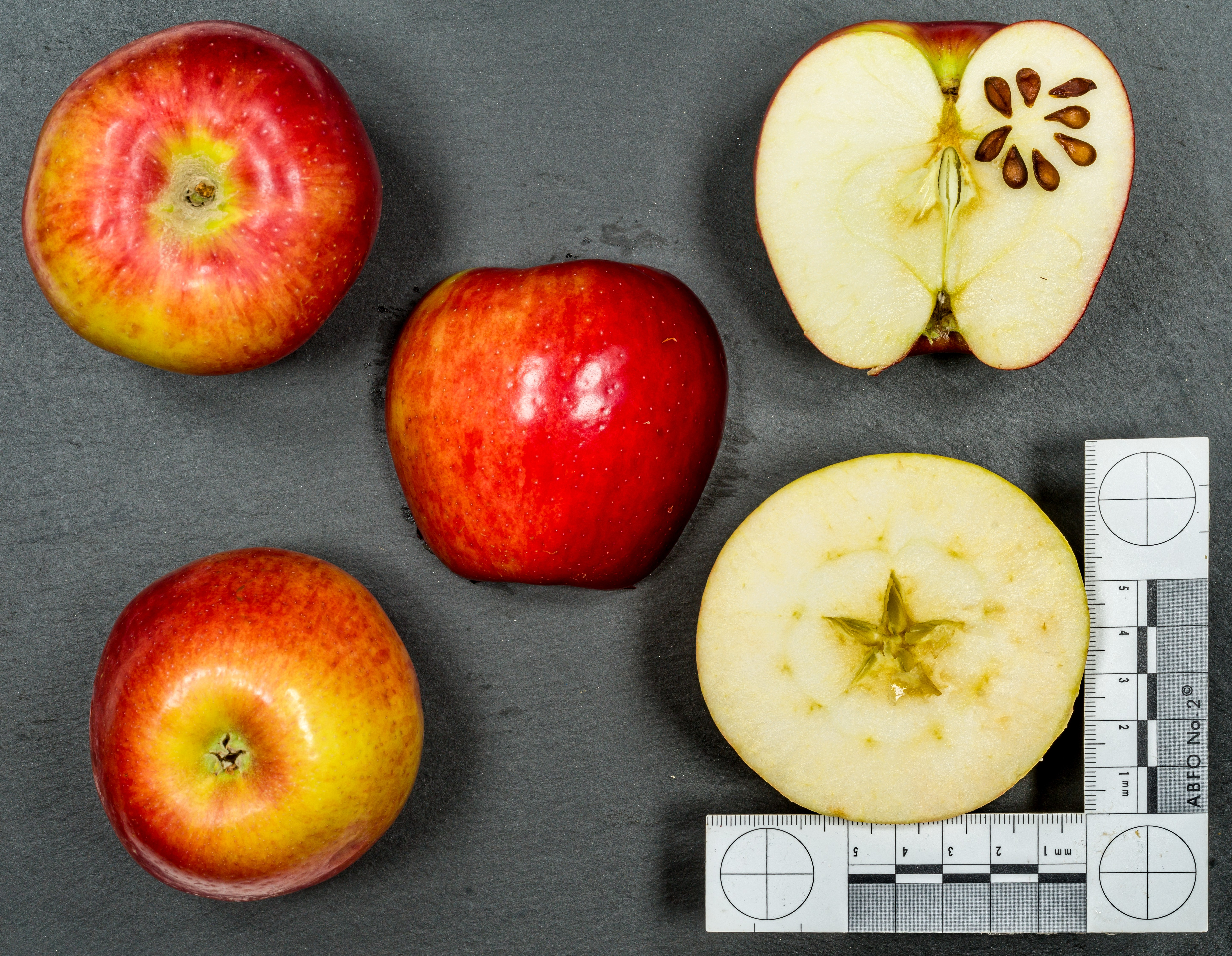 Apfelsorte: Arkcharm